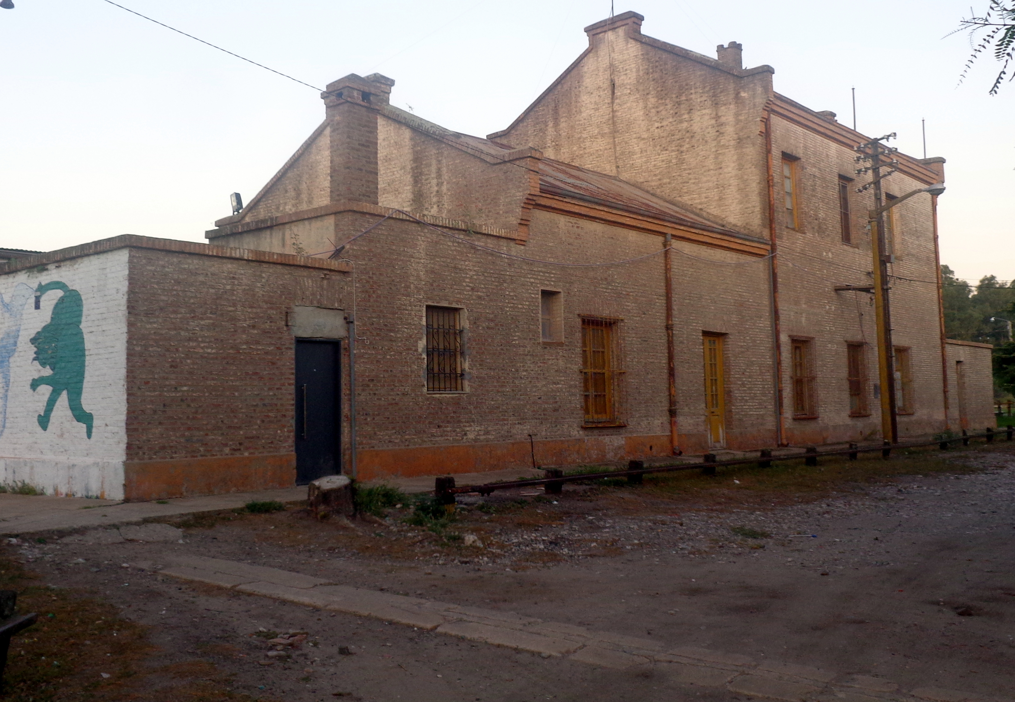 Estación de tren en Santa Lucía, San Pedro, Buenos Aires, Argentina.